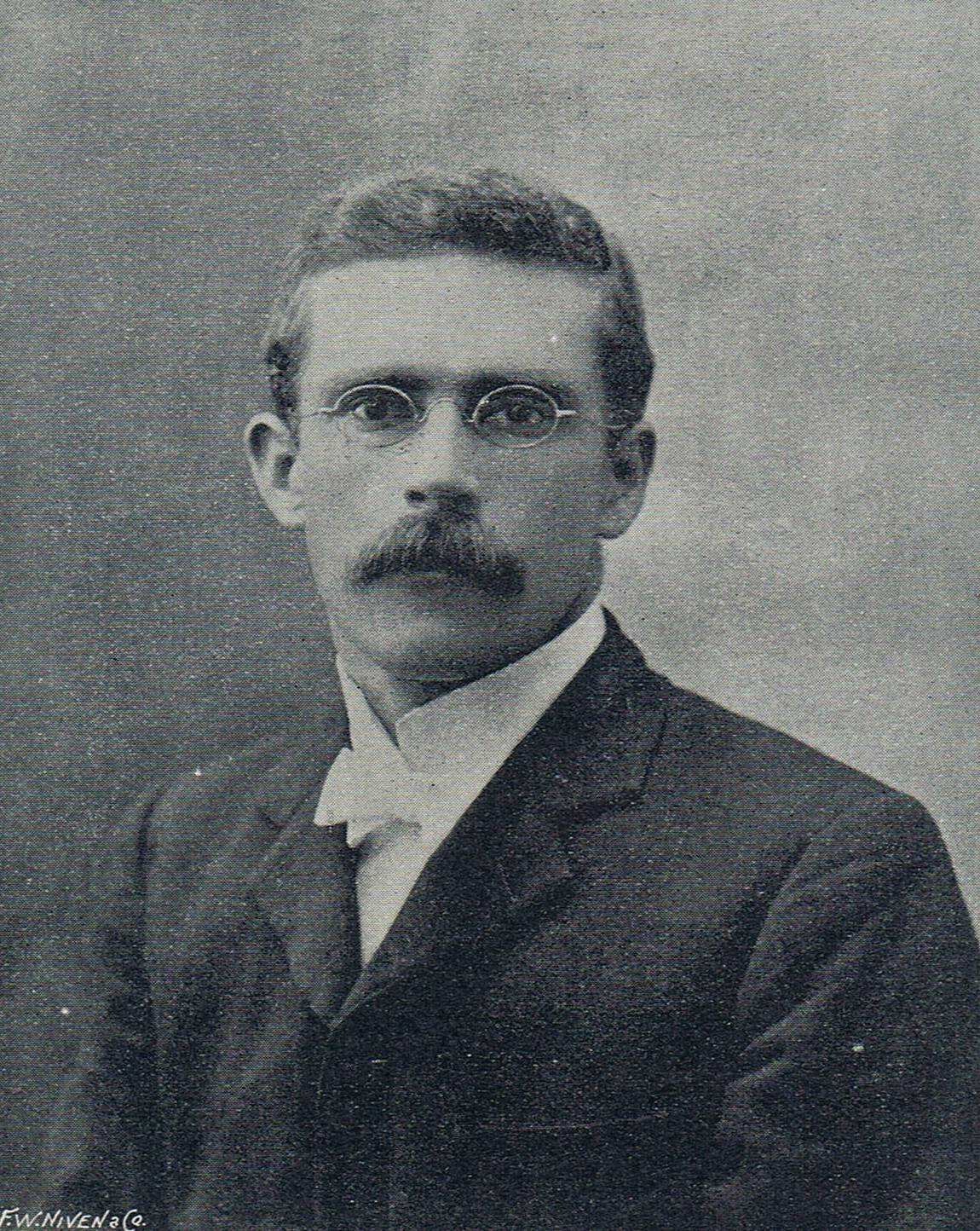 Norman K. Ewing.